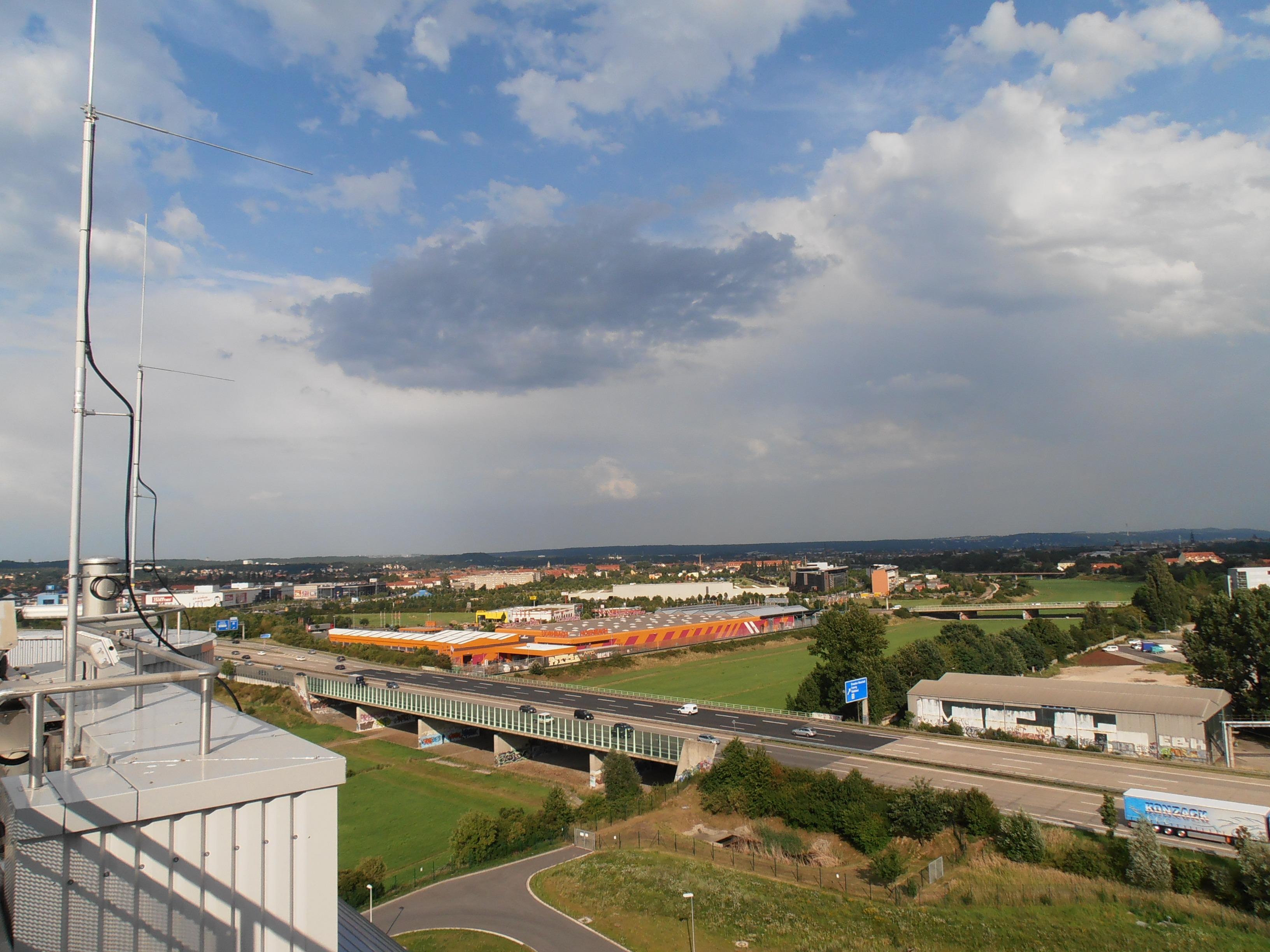 Blick von den Faultürmen der Kläranlage Kaditz. Im Vordergrund die Autobahnbrücke der A4 über die Kaditzer Flutrinne.